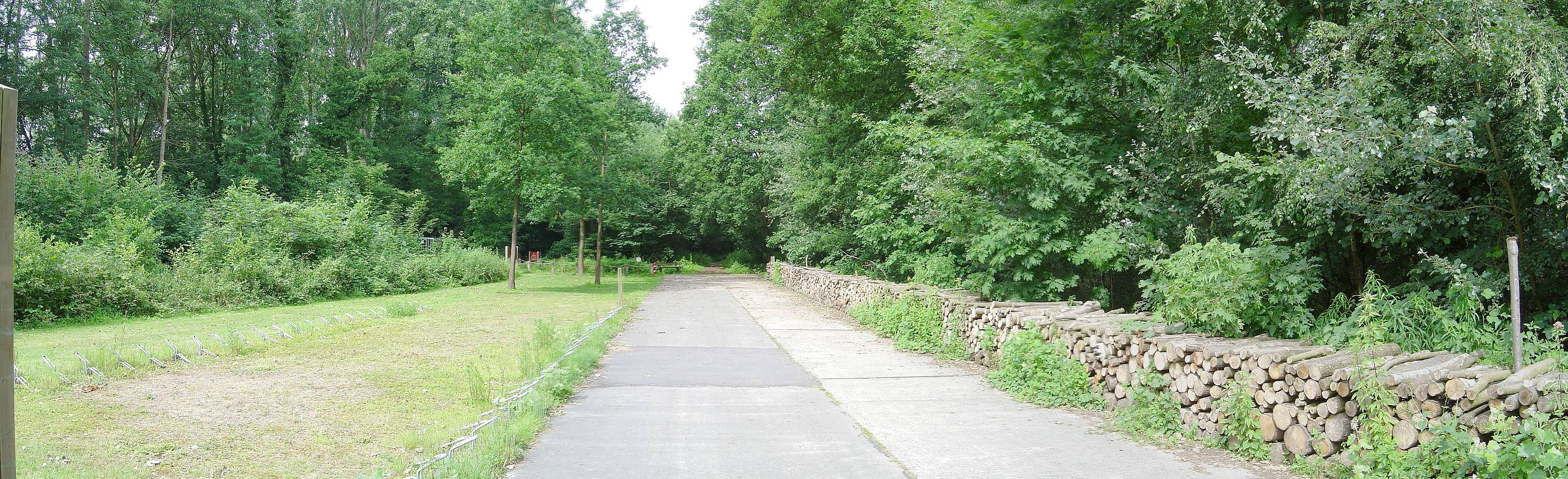 Panorama picture inside Het Leen, nature reserve in Belgium